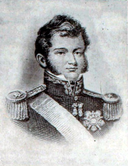 imagen de O´Higgins en billetes fiscales de inicios del siglo XX.